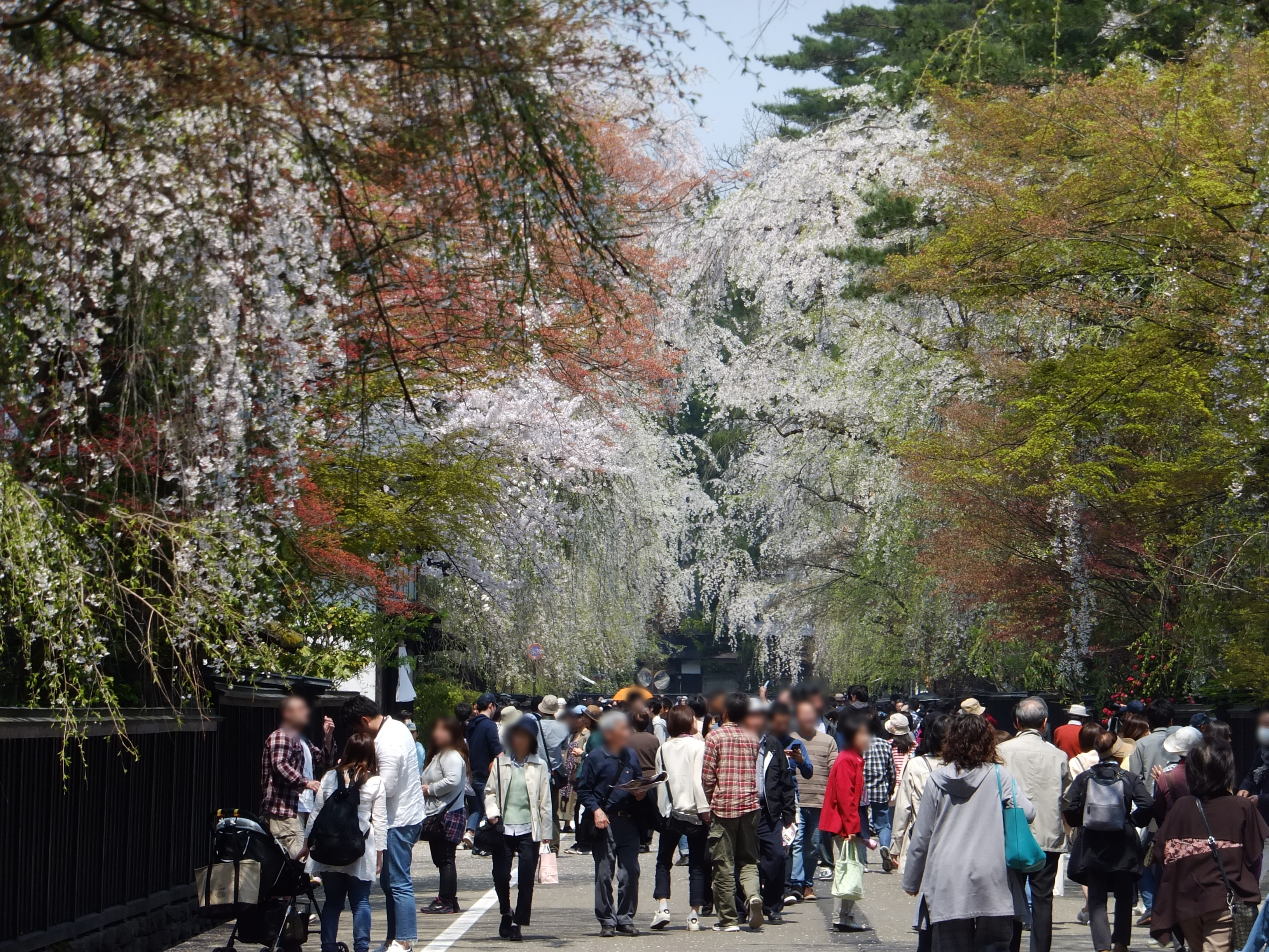 満開の桜と観光客でにぎわう武家屋敷通り(秋田県仙北市 角館)